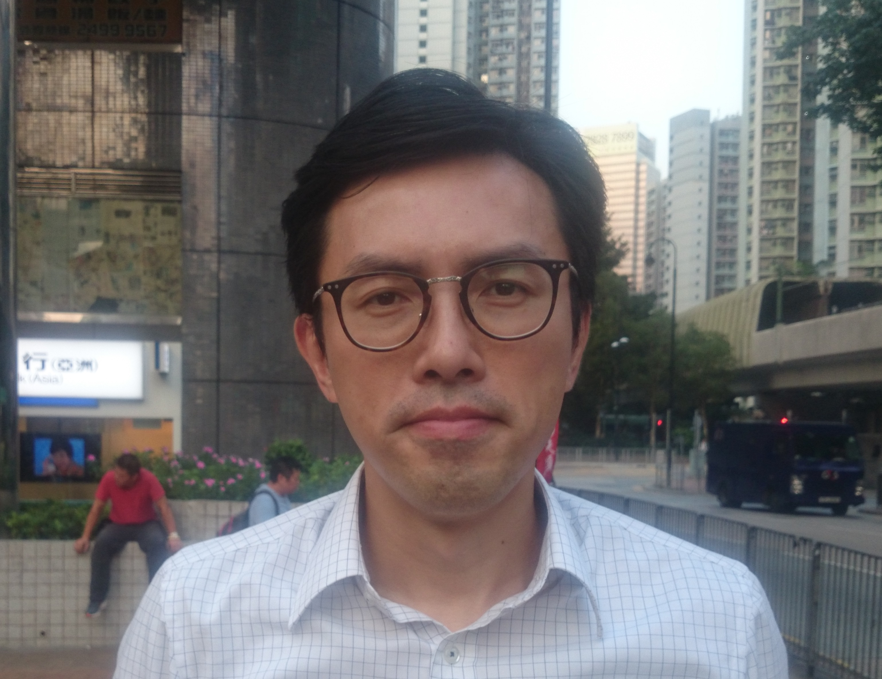 粵語: 喺2017年9月27號嘅黃昏，吳文遠企咗喺葵涌廣場出面。